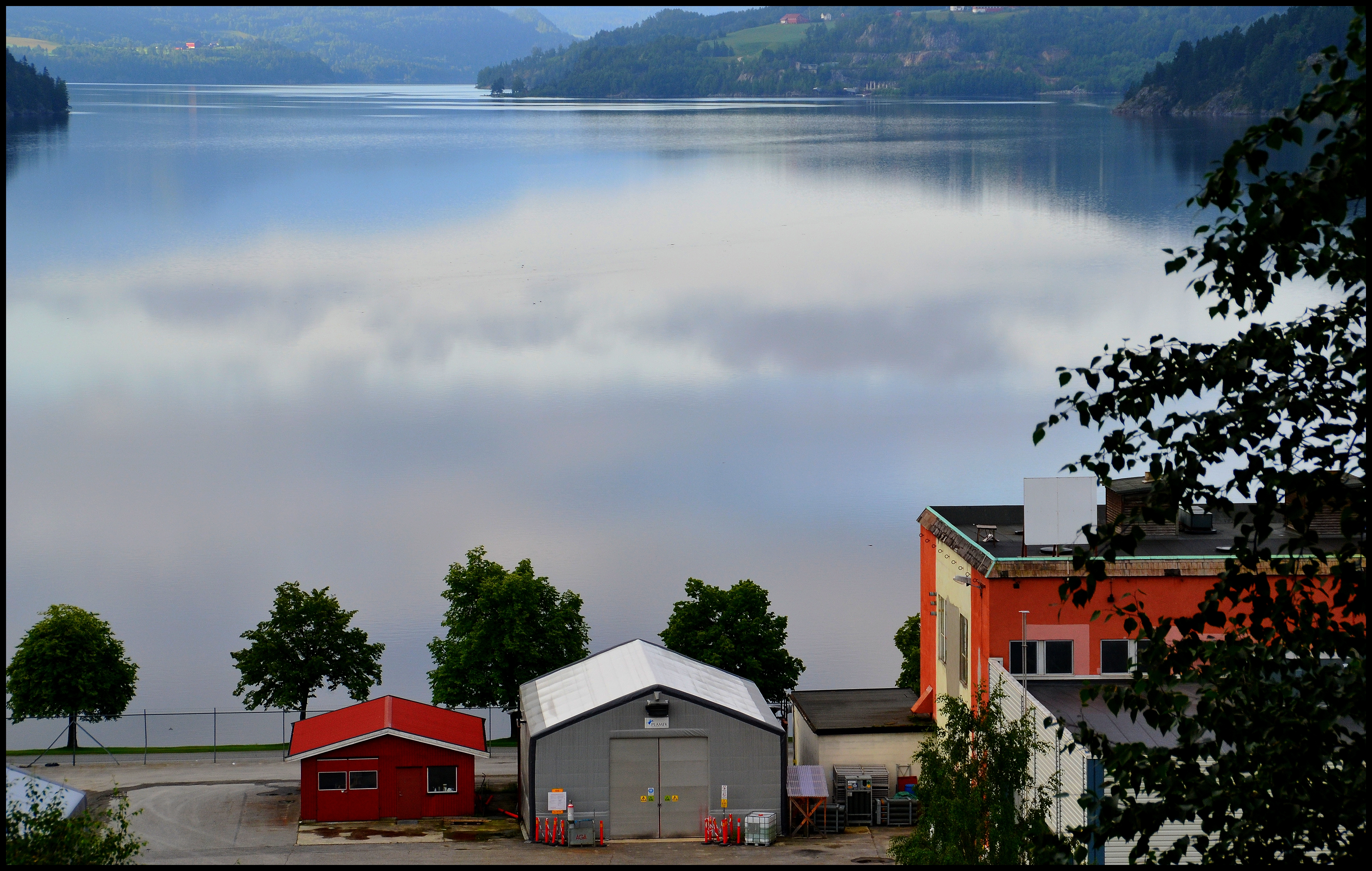 Heddalsvannet, Notodden, Telemark, Norge